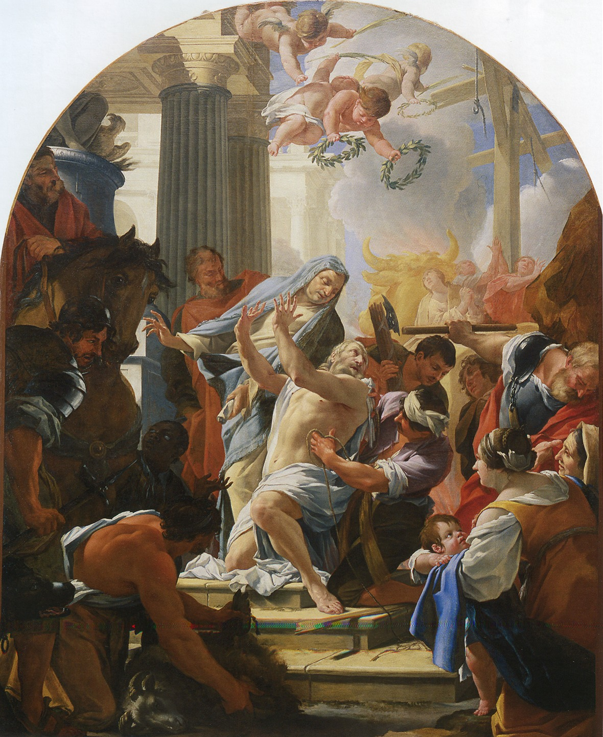 Martyre de saint Eustache, 1635, huile sur toile, 300 x 260 cm, Paris, Eglise Saint-Eustache